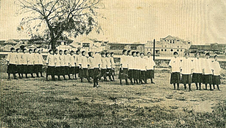 宁波甬江女中学生在操场